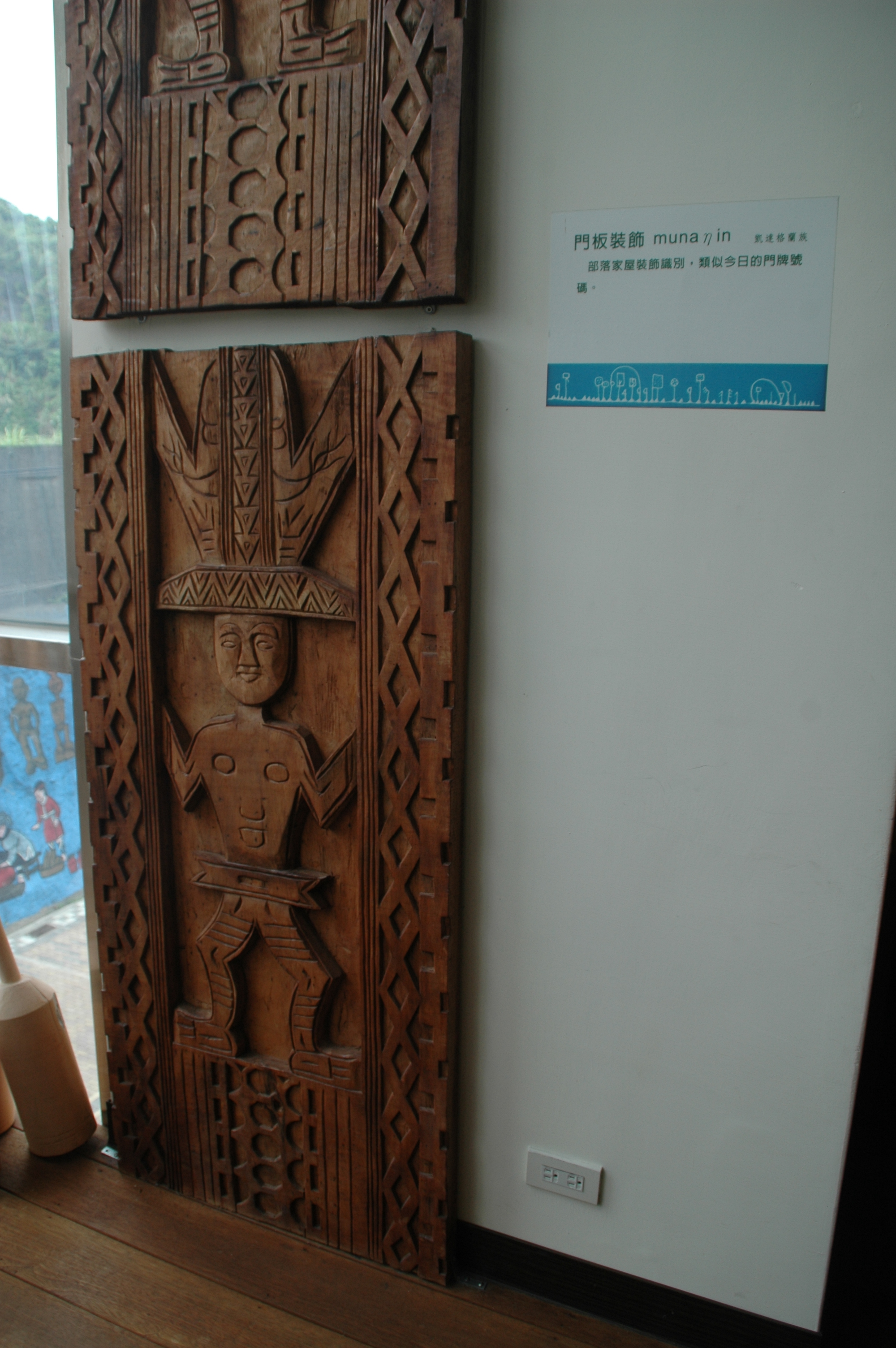 中文（台灣）: 基隆市文物館1